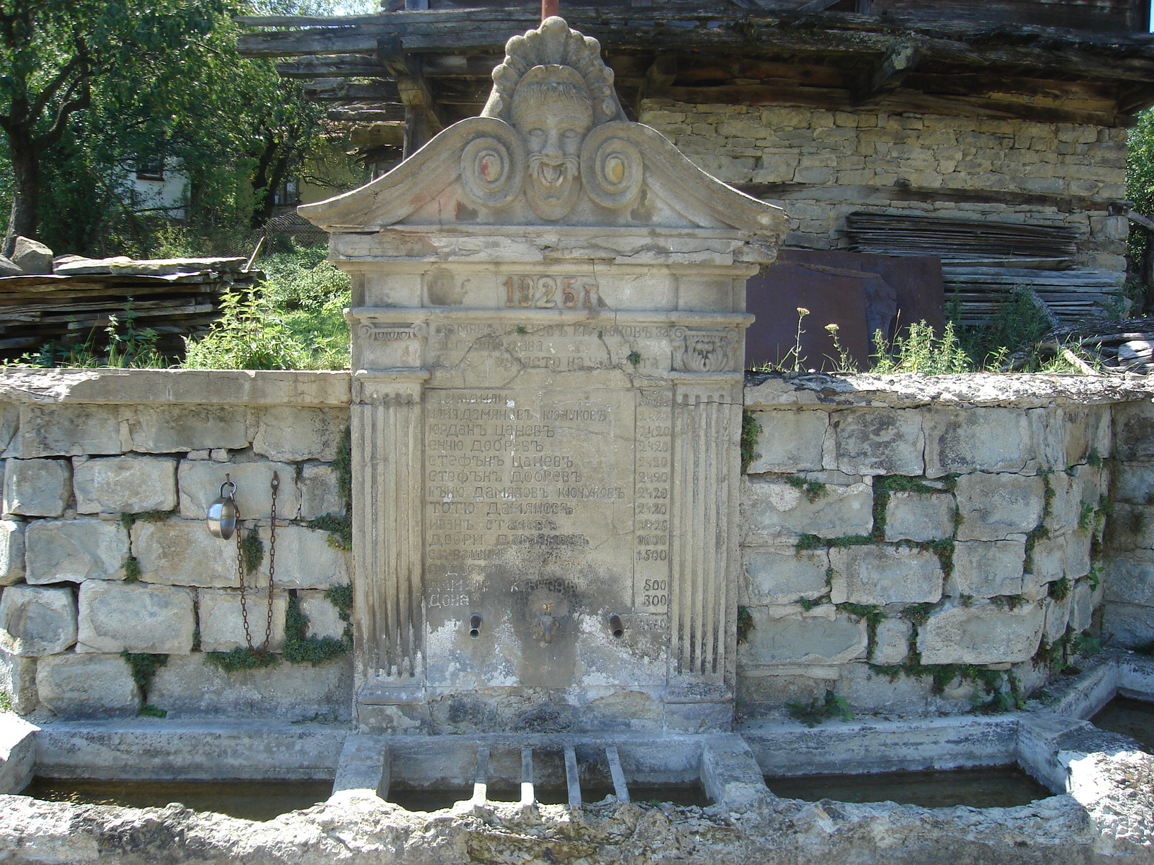 Долната чешма в с. Носеите, от 1925г.